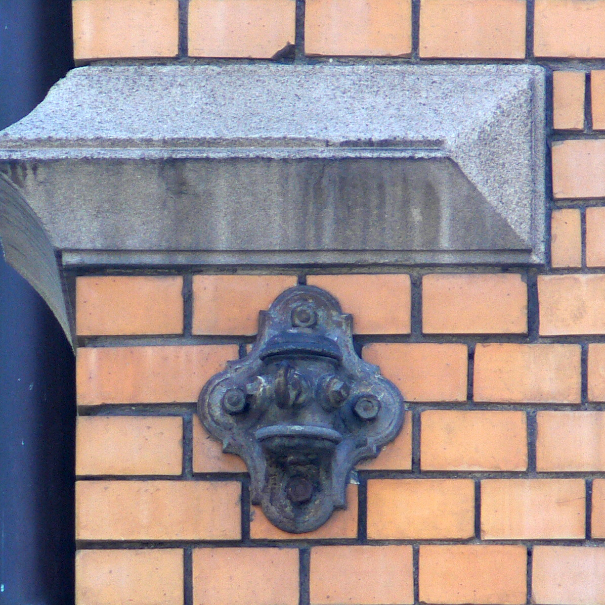 Ravensburg Oberleitungsrosette der ehem. Straßenbahn Ravensburg-Weingarten-Baienfurt am Gebäude Gartenstraße 10